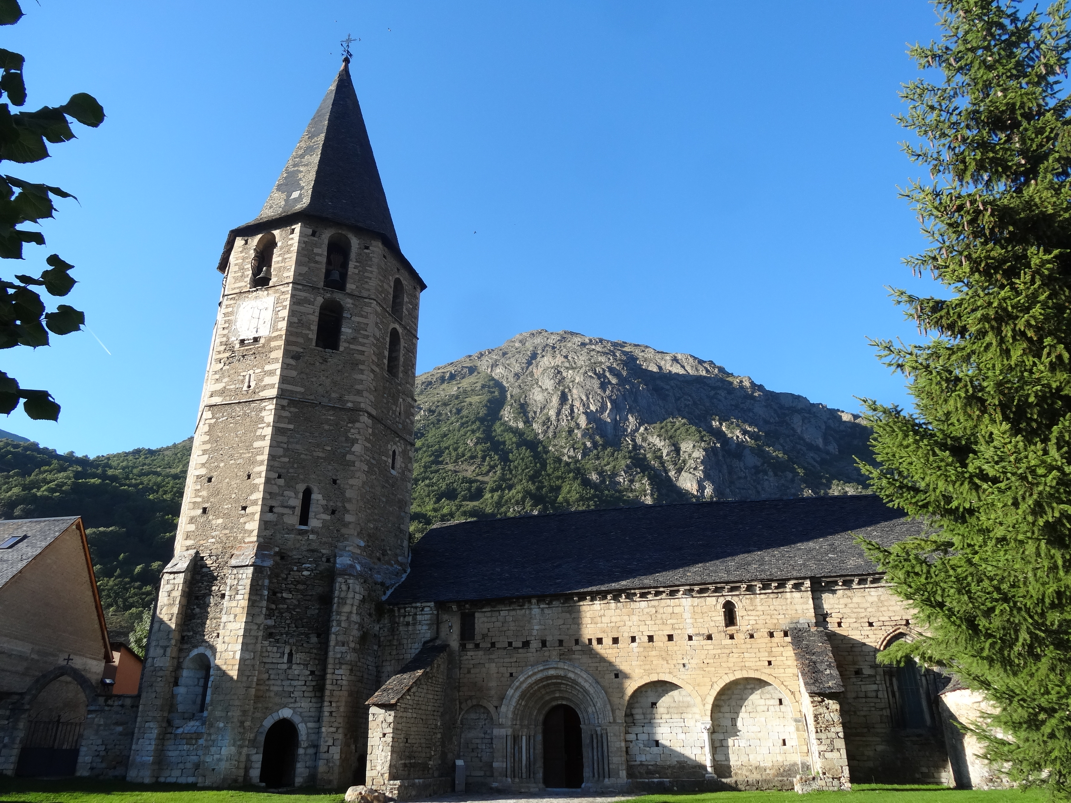 25598 Salardú, Lérida, Spain